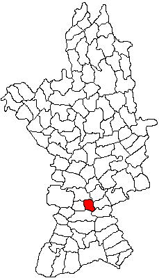 Categorie:Hărţi ale judeţului Olt